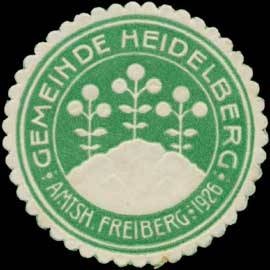 Sealing stamp Title: Gemeinde Heidelberg Description: Amtsh. Freiberg, grün, weiß, geprägt Place: Heidelberg size: 4 cm